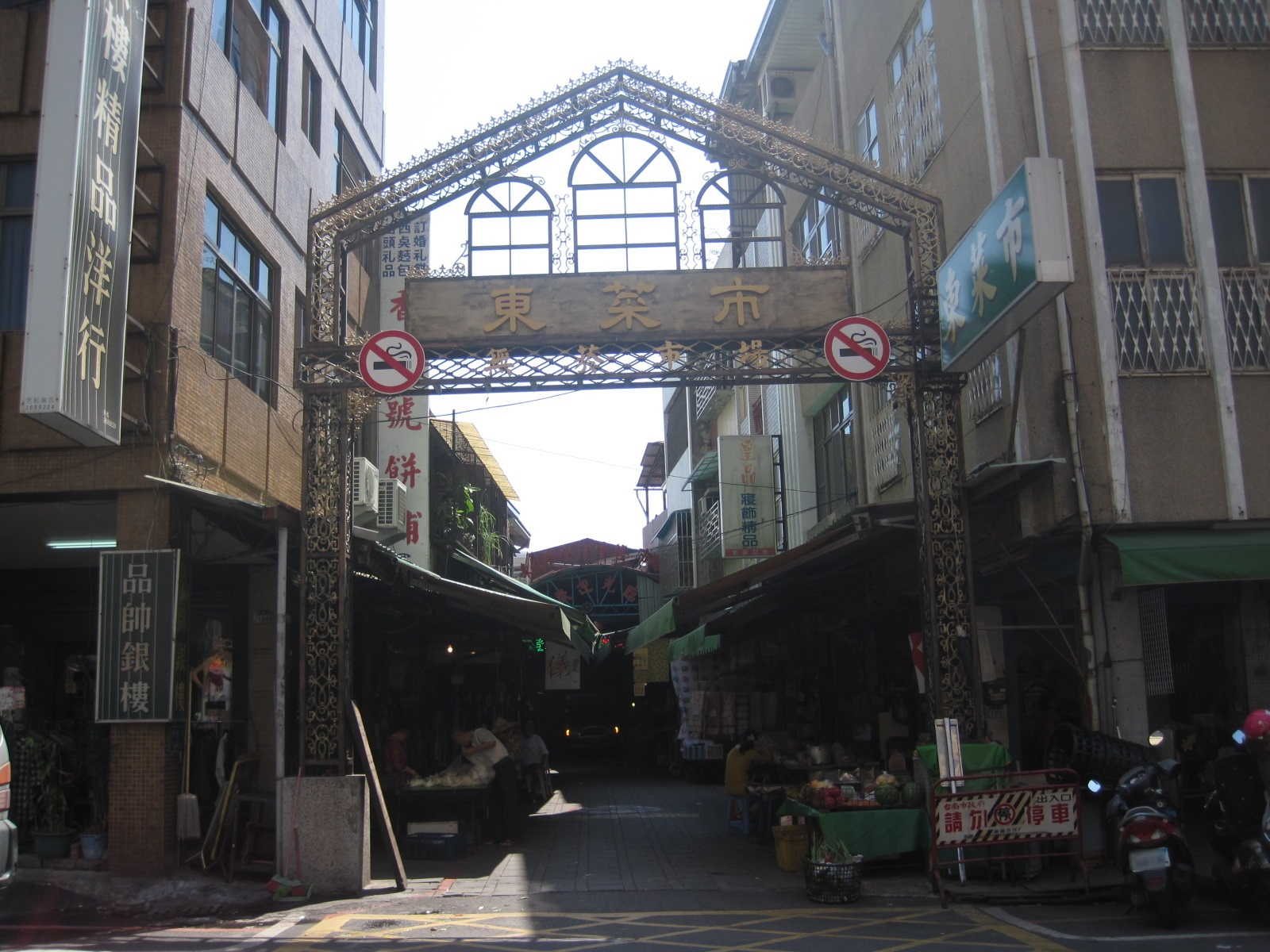 臺南東菜市